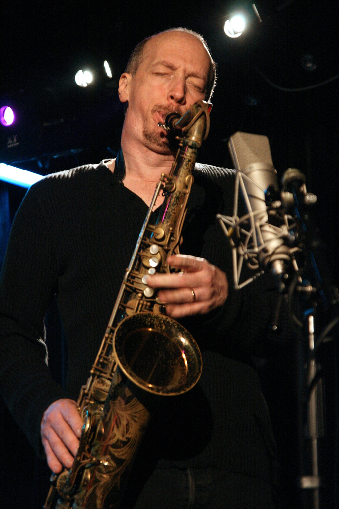 Ellery Eskelin en concert au Triton (Les Lilas-France)